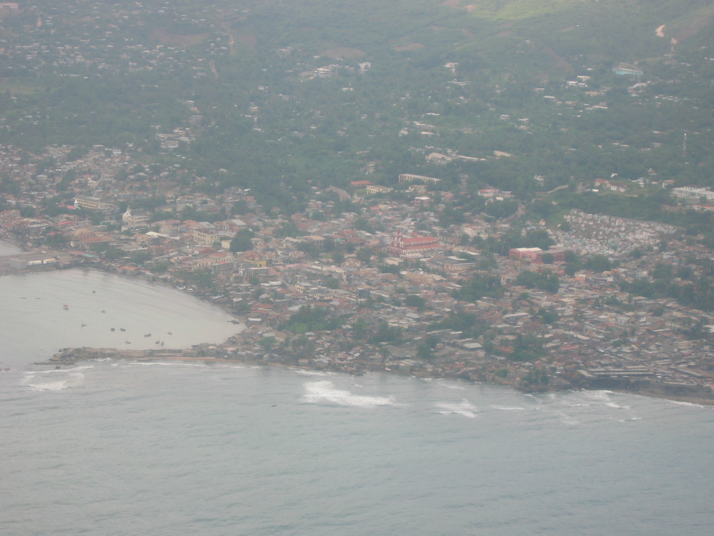 Jérémie, Haiti